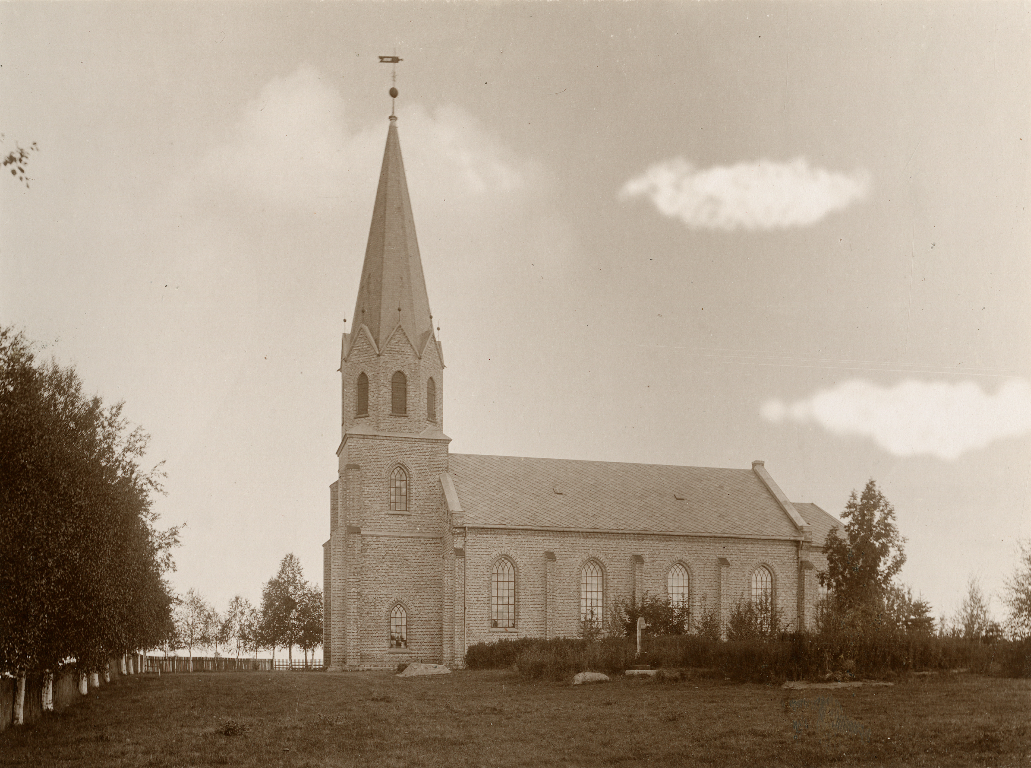 Årnes kirke i Årnes, Akershus